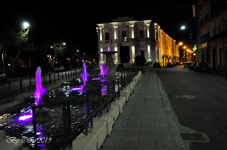 Edificio ex Poste sullo sfondo in Piazza Crispi nel centro storico di Cosenza e fontana del Balilla